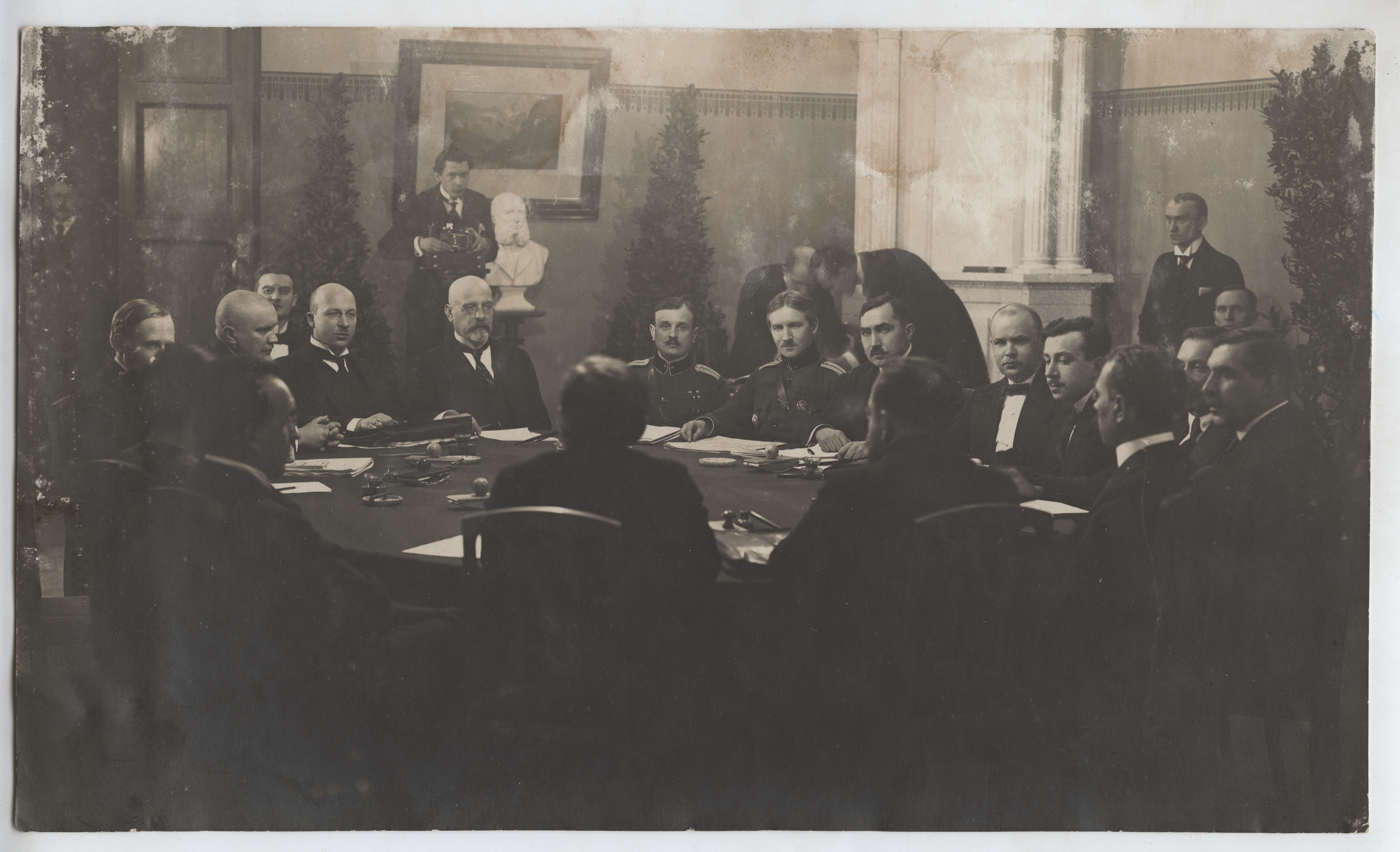 Tartu rahulepingu sõlmimine. Delegaadid ja eksperdid nõupidamisel. Ees keskel Eesti delegatsiooni juht J. Poska, paremal kindral J. Soots, kol. V. Mutt ja A. Piip. Vasakul laua otsas A. Oinas, M. Püüman ja J. Seljamaa, nende taga istub A. Birk.